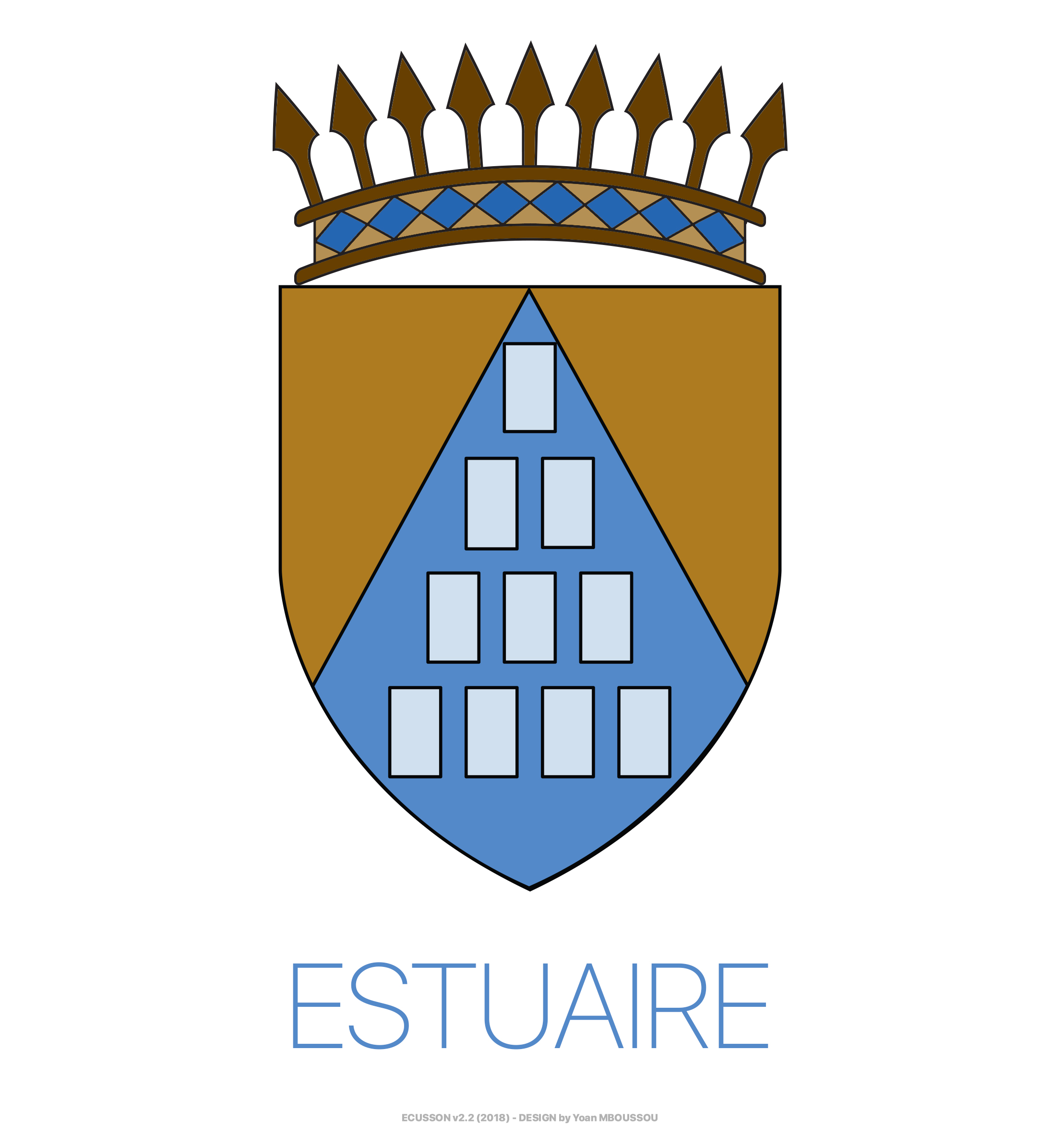 Ecusson de l’estuaire